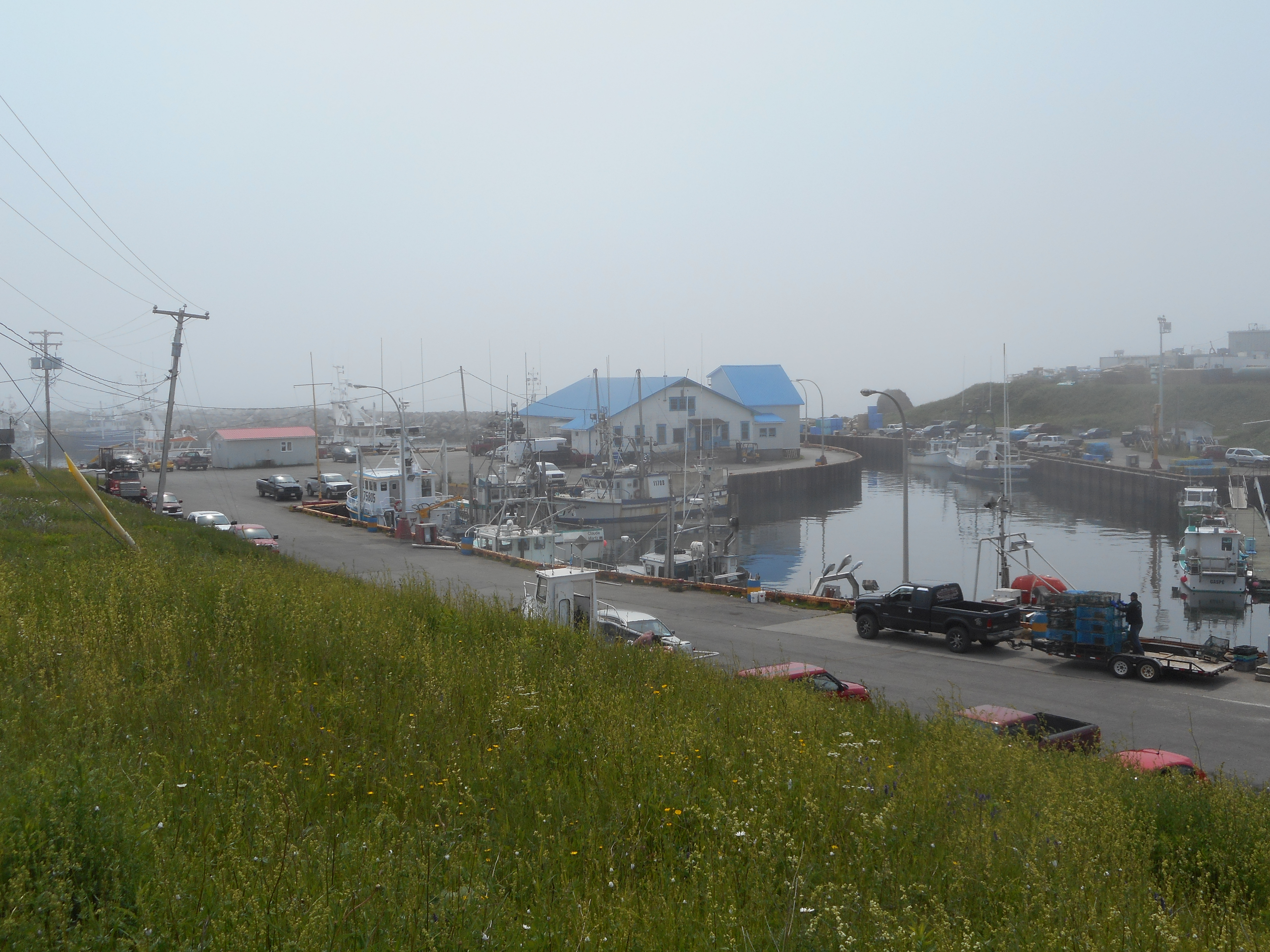 Lelièvre, Lelièvre et Lemoignan - Économusée du salage et du séchage du poisson, 52, rue des Vigneaux, Sainte-Thérèse-de-Gaspé, Québec